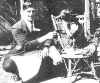 Bluey (Les Hall, Austrália, 7 de junho de 1910 - Rochester, Austrália, 14 de novembro de 1939)